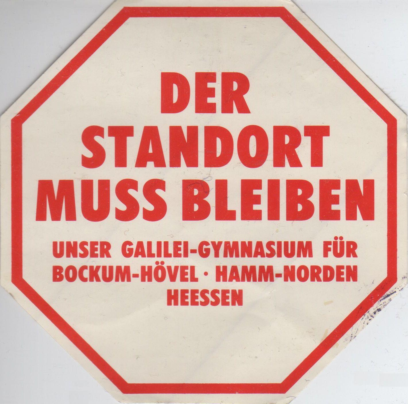 Das Foto zeigt einen Scan des Aufklebers "Der Standort muss bleiben", gedruckt 1987 anlässlich der Proteste zum Erhalt des Galilei-Gymnasiums Hamm.